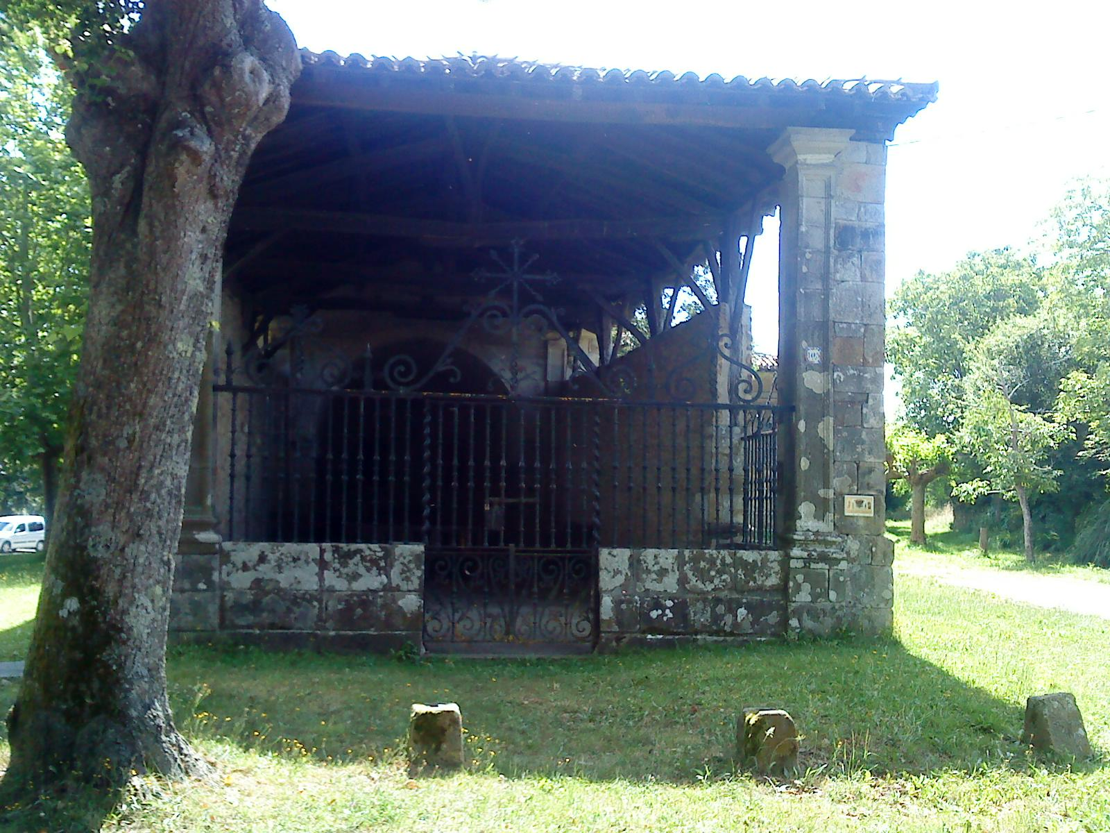 Errigoiti. Humilladero de San Antonio. En Vizcaya, País Vasco (España)